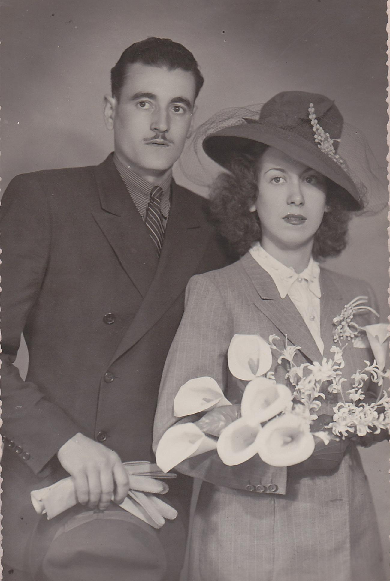 Jaume Llargués Sabatés i esposa